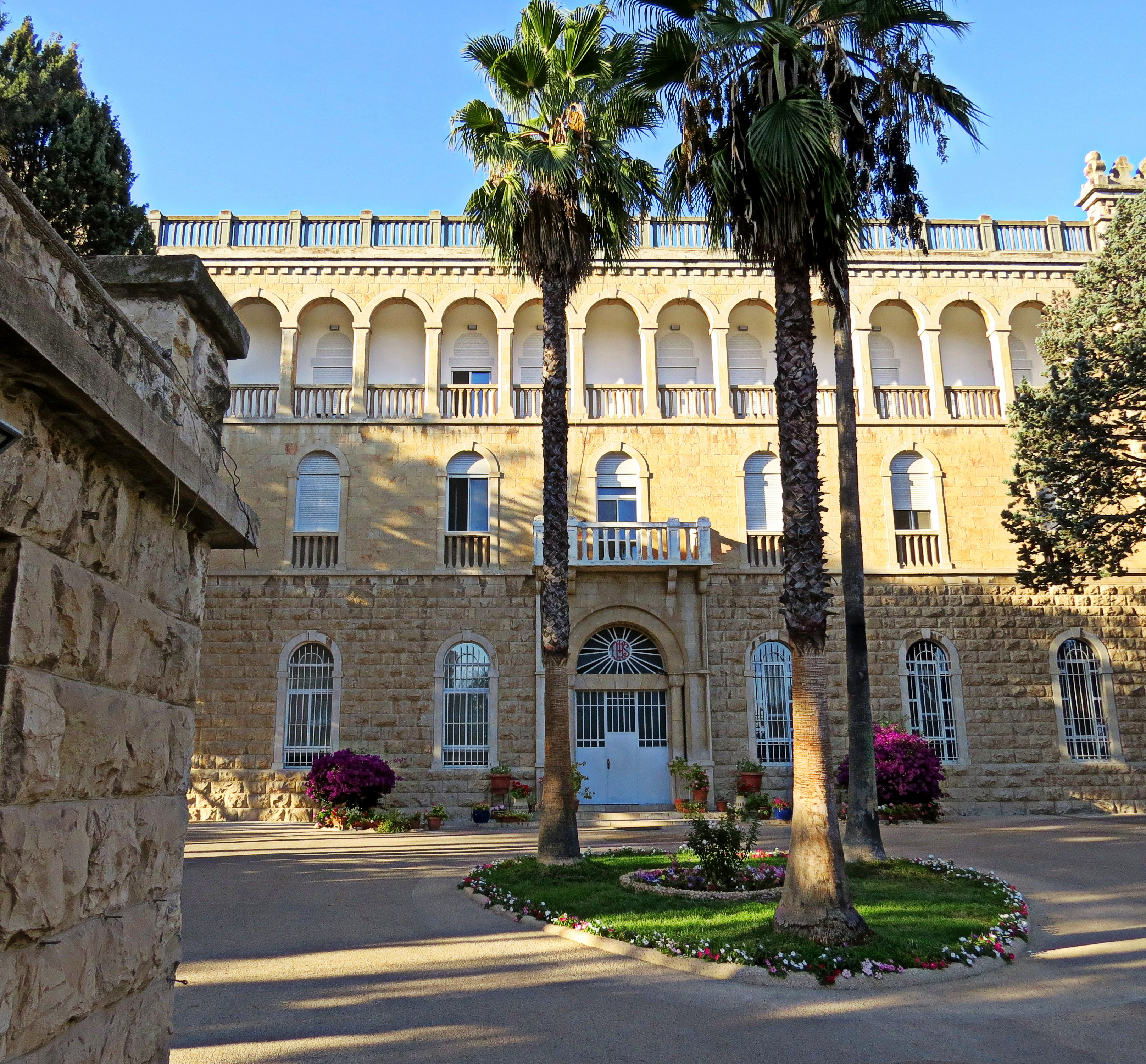 המכון האפיפיורי למקרא הוא מוסד אקדמאי ללימודי מקרא, ארכאולוגיה ולימודי המזרח התיכון, המסונף לאוניברסיטה האפיפיורית הגריגוריאנית ומיועד לתלמידים נוצרים קתולים. למכון סניף בירושלים שהוקם ביוזמת הוותיקן ברחוב אמיל בוטה, המשמש כבית ספר ומעון סטודנטים.